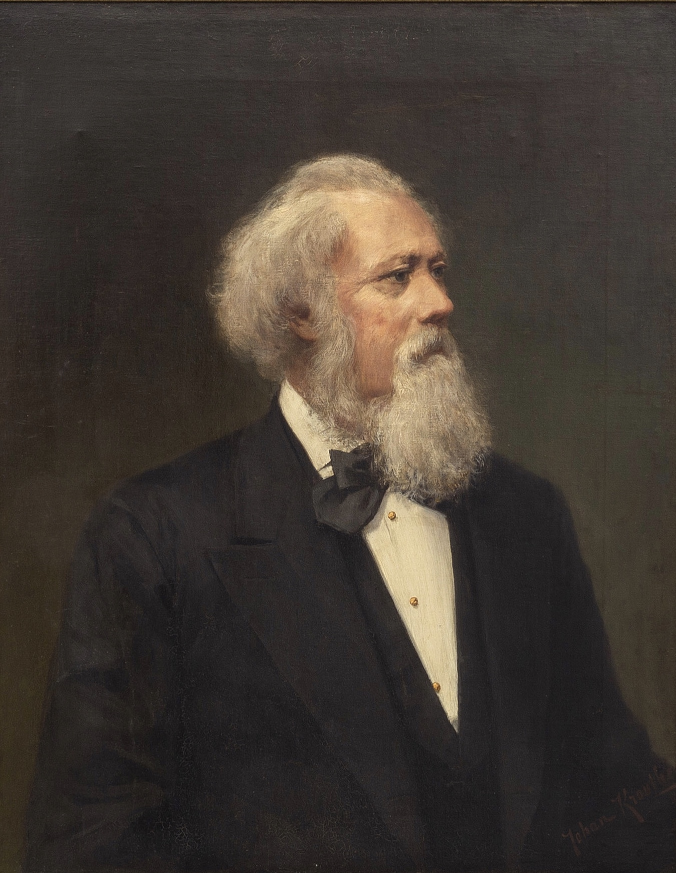 Porträtt av Carl Fredrik Ridderstad (1807-1886), avporträtterad av Johan Krouthén år 1900 efter ett fotografi från 1882. Ridderstad bär svart kostym med svart väst, den vita skjortan är knäppt med guldknappar. Flugan är svart.